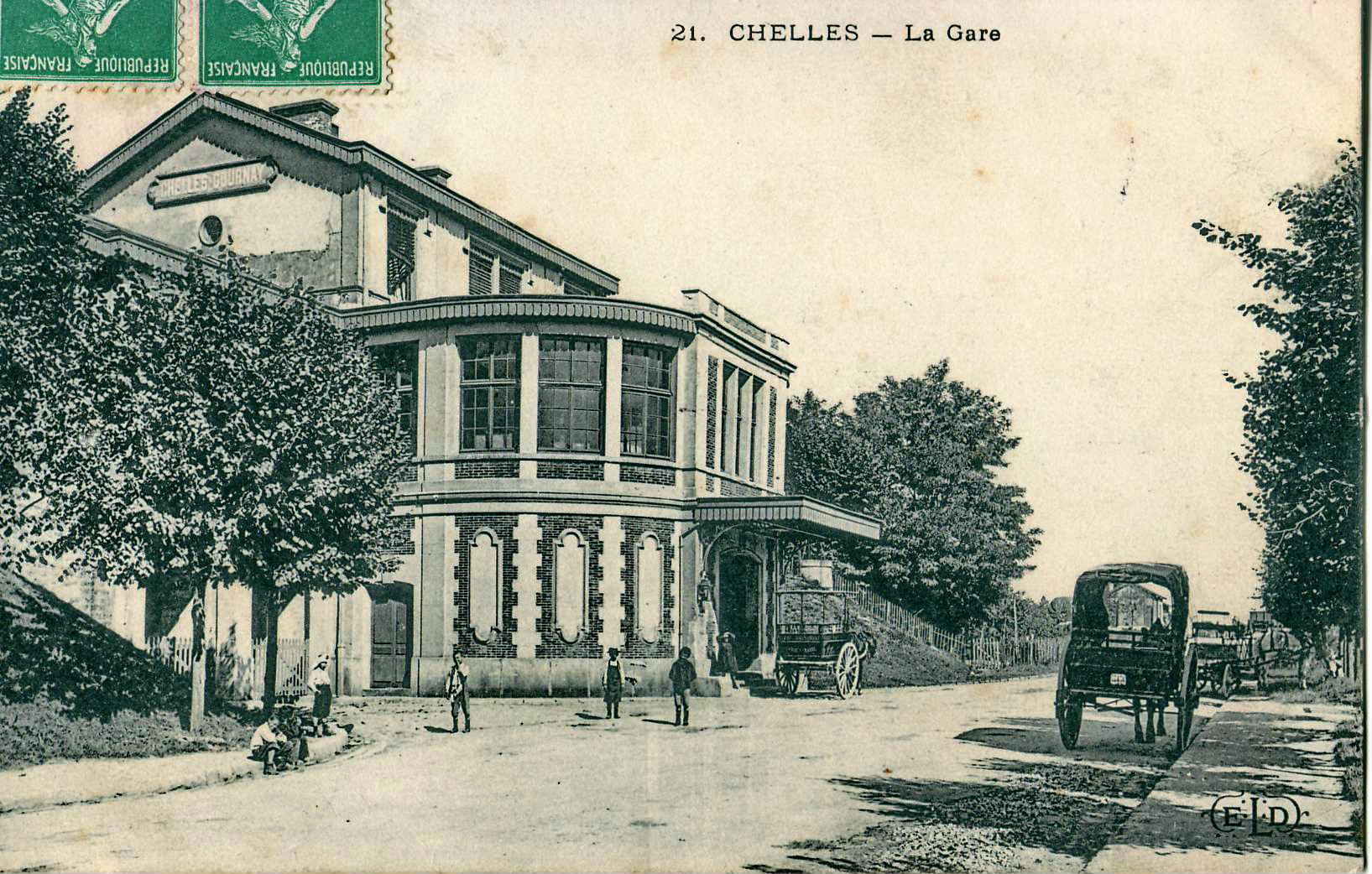 Carte postale ancienne éditée par ELD, n°21 :CHELLES - La Gare